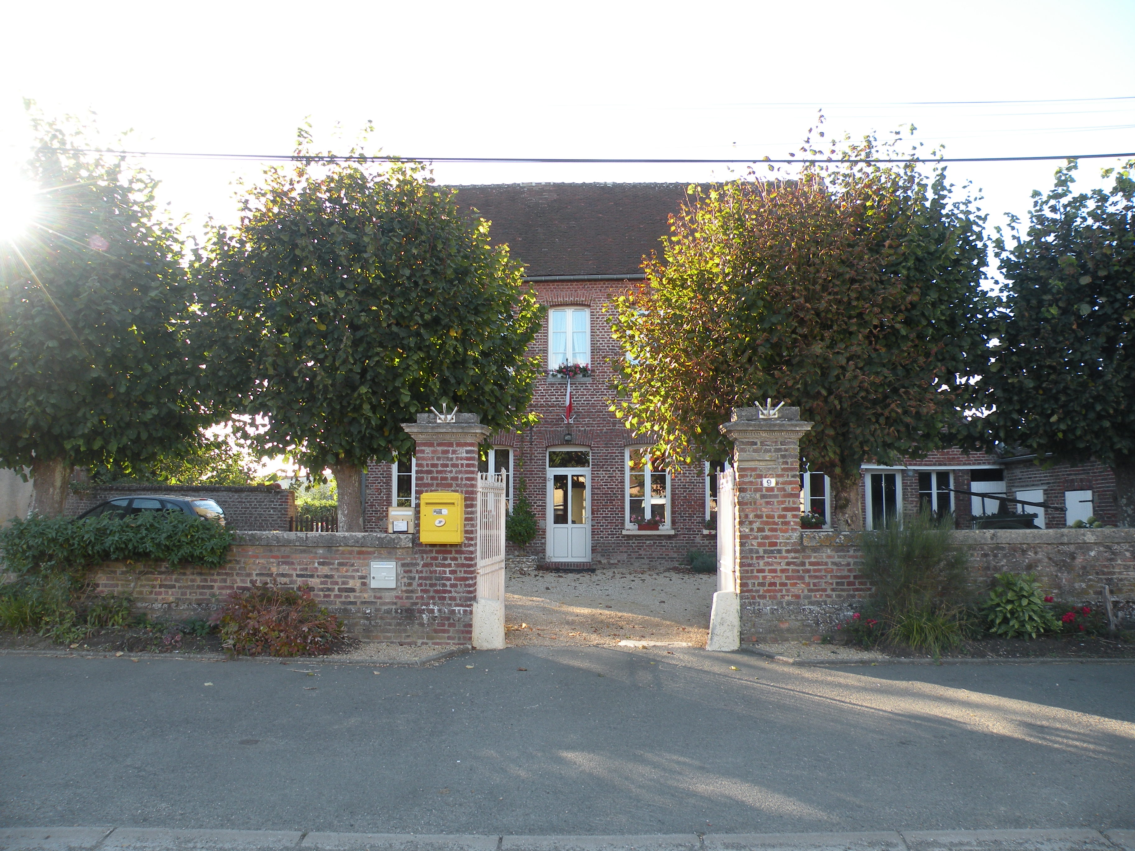 mairie de La Neuville-Garnier